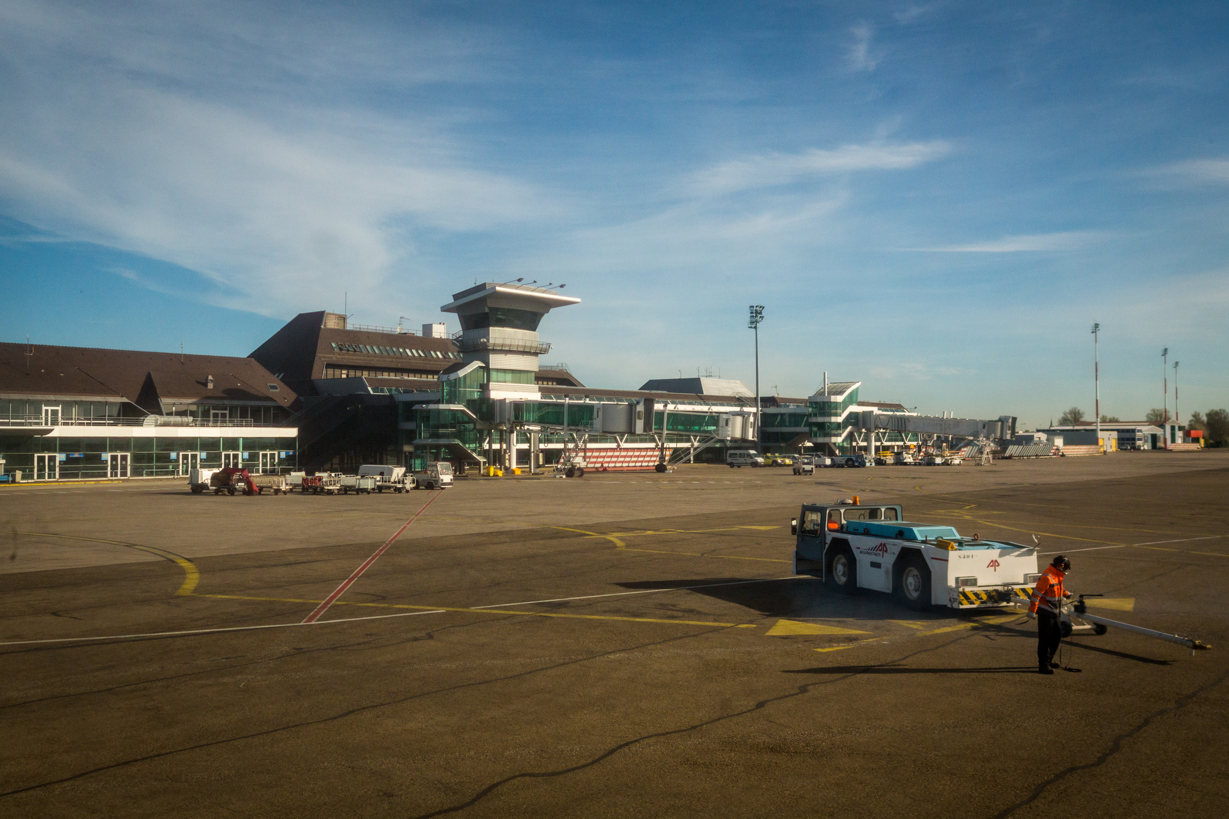 Aéroport Strasbourg Entzheim SXB avril 2015